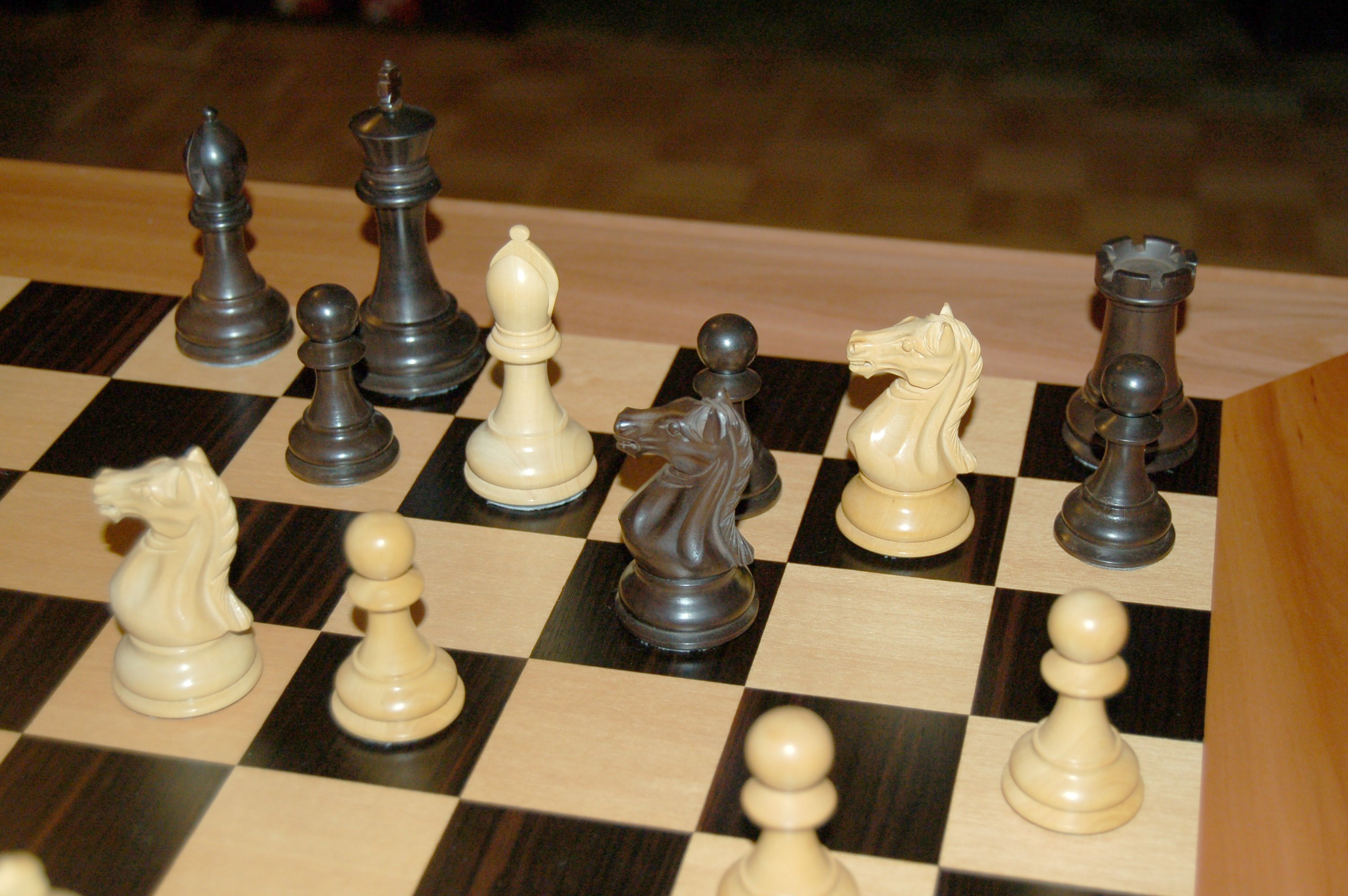 Schachfiguren im Staunton-Format aus Buchsbaum, Schachbrett aus Ahorn und Ebenholz, Schlussposition aus der Unsterblichen Partie